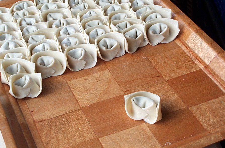 馄饨